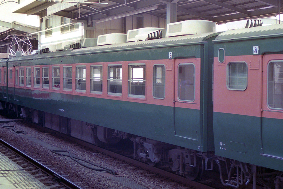 国鉄 モハ165-1